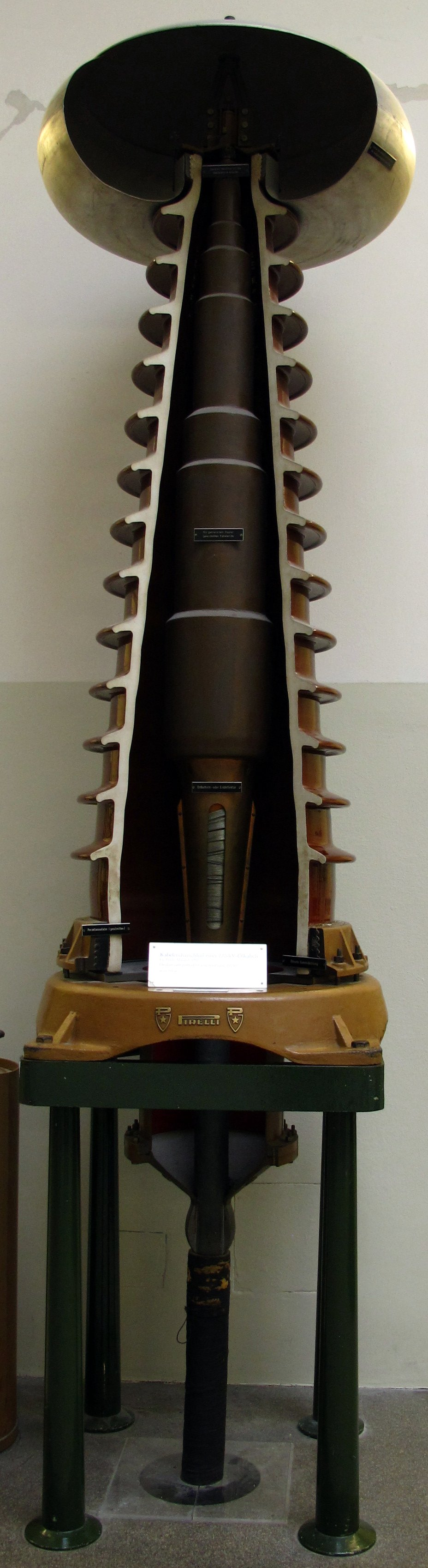 Kabelendverschluss eines 220-kV-Ölkabels, aufgeschnitten. Hersteller: Pirelli, 1952